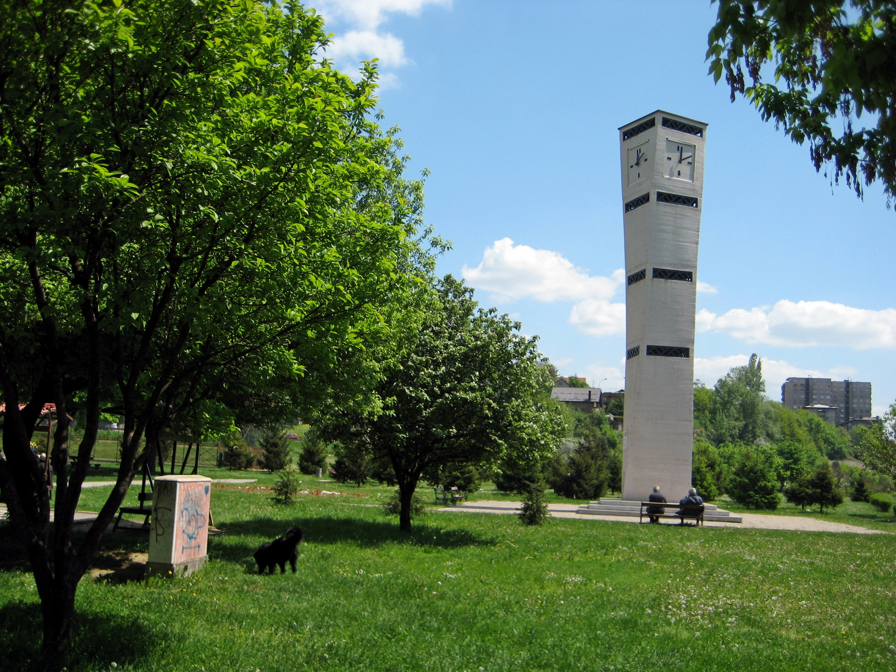 Zenica 72000, Bosnia and Herzegovina